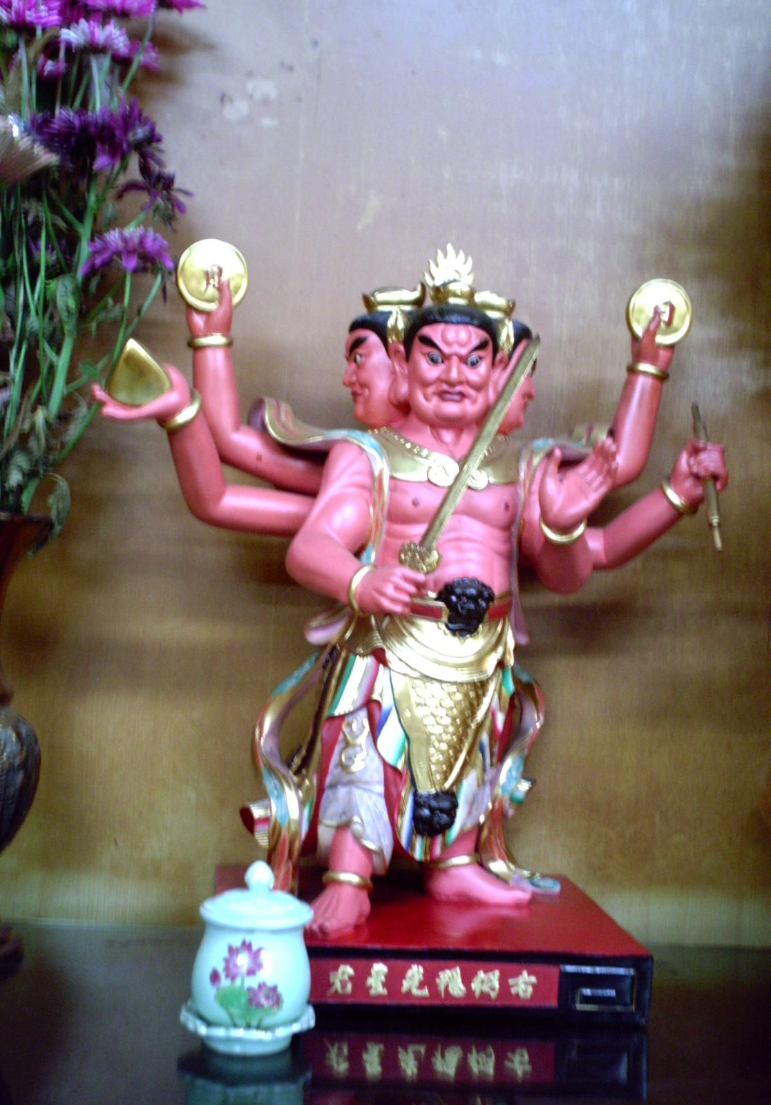 中文（台灣）: 右弼隱光星君